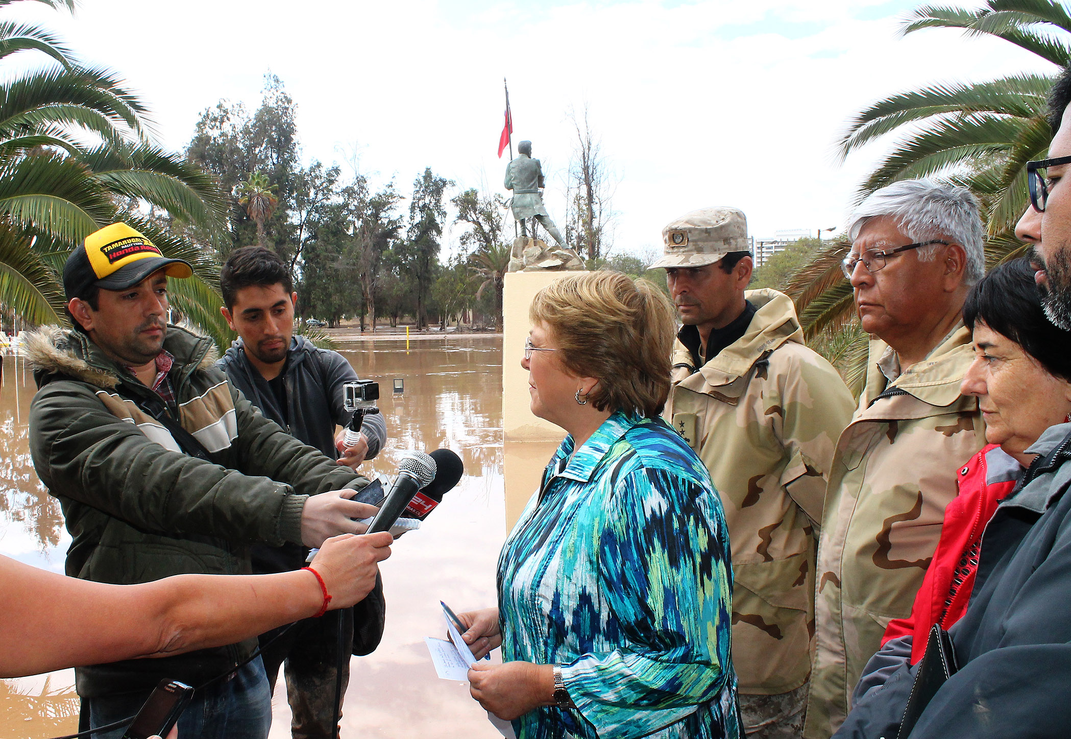 Gobierno de Chile